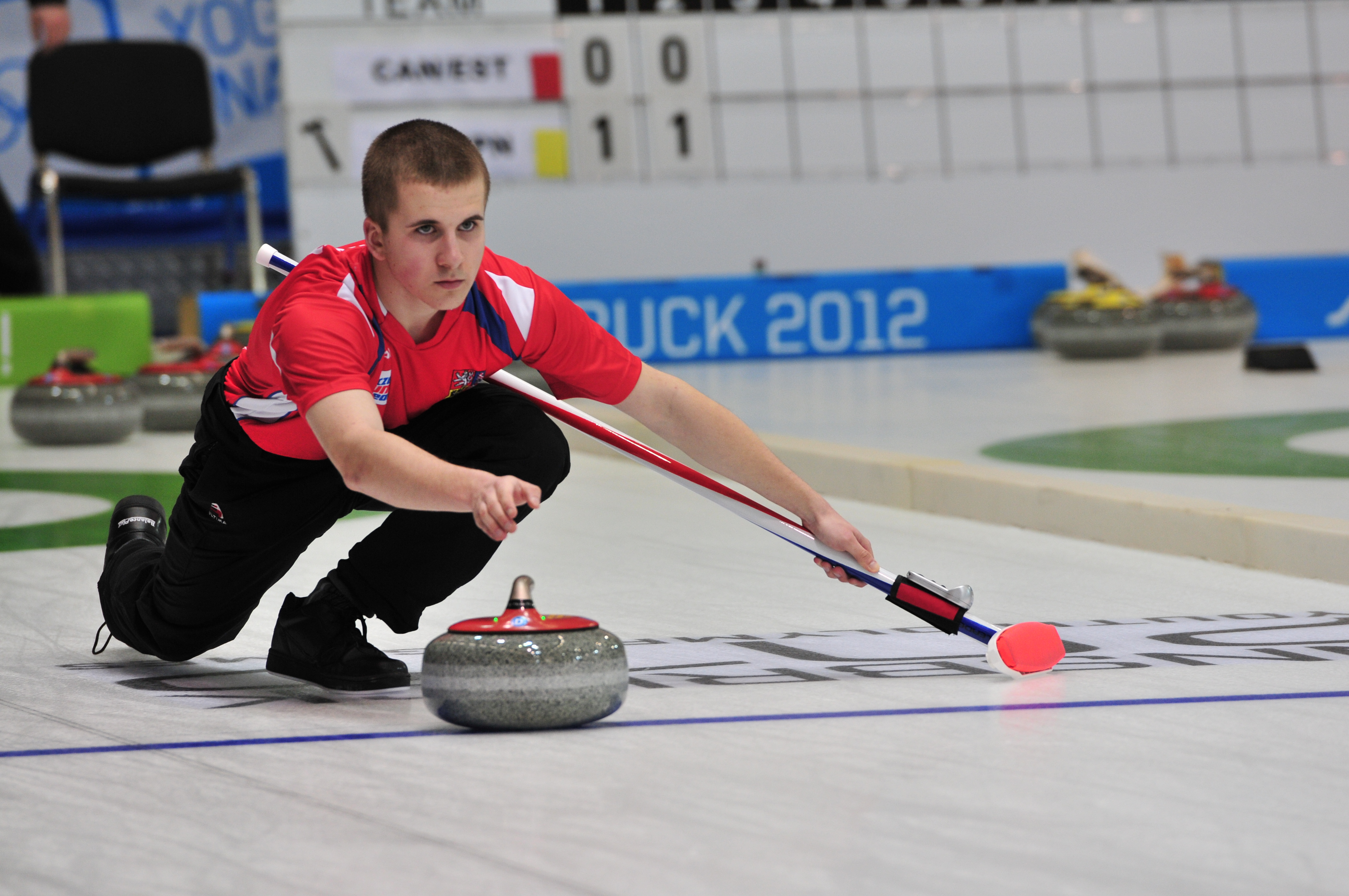 1. Jugendolympiade 2012 Innsbruck Erste Olympische Jugend- Winterspiele 201213. bis 22. Jänner in Innsbruck Dieses Foto wurde durch die Unterstützung von Wikimedia Österreich und die Twoonix Software GmbH ermöglicht.